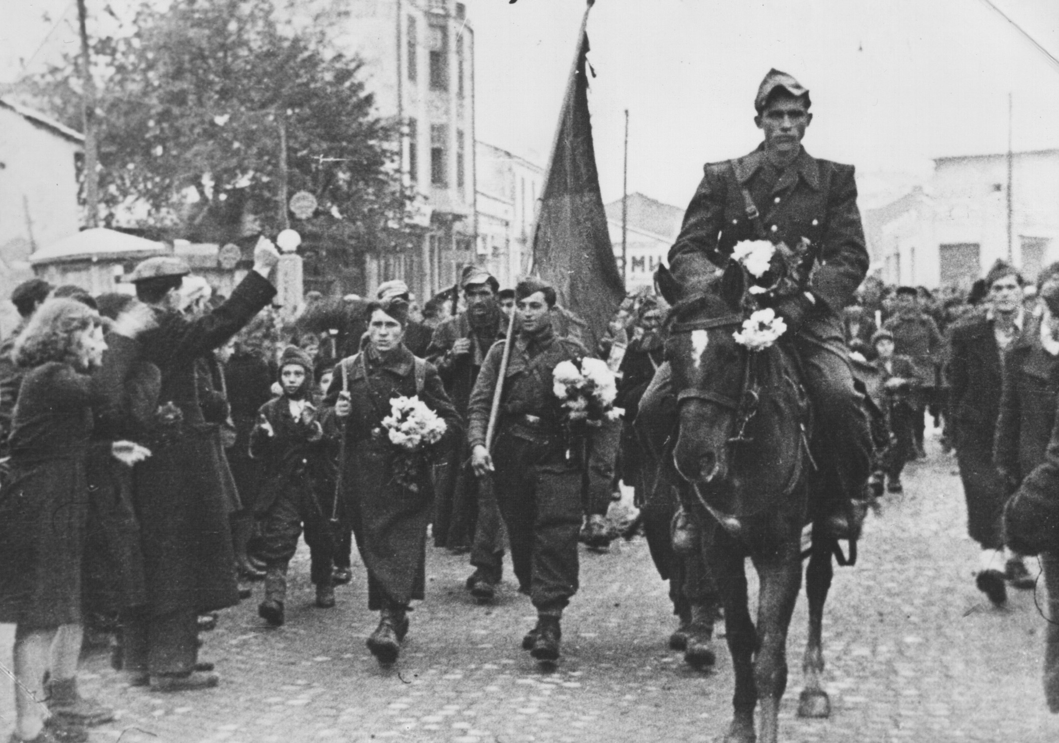 Srpskohrvatski / српскохрватски: Ulazak 42. divizije NOVJ u oslobođeno Skoplje, novembra 1944.